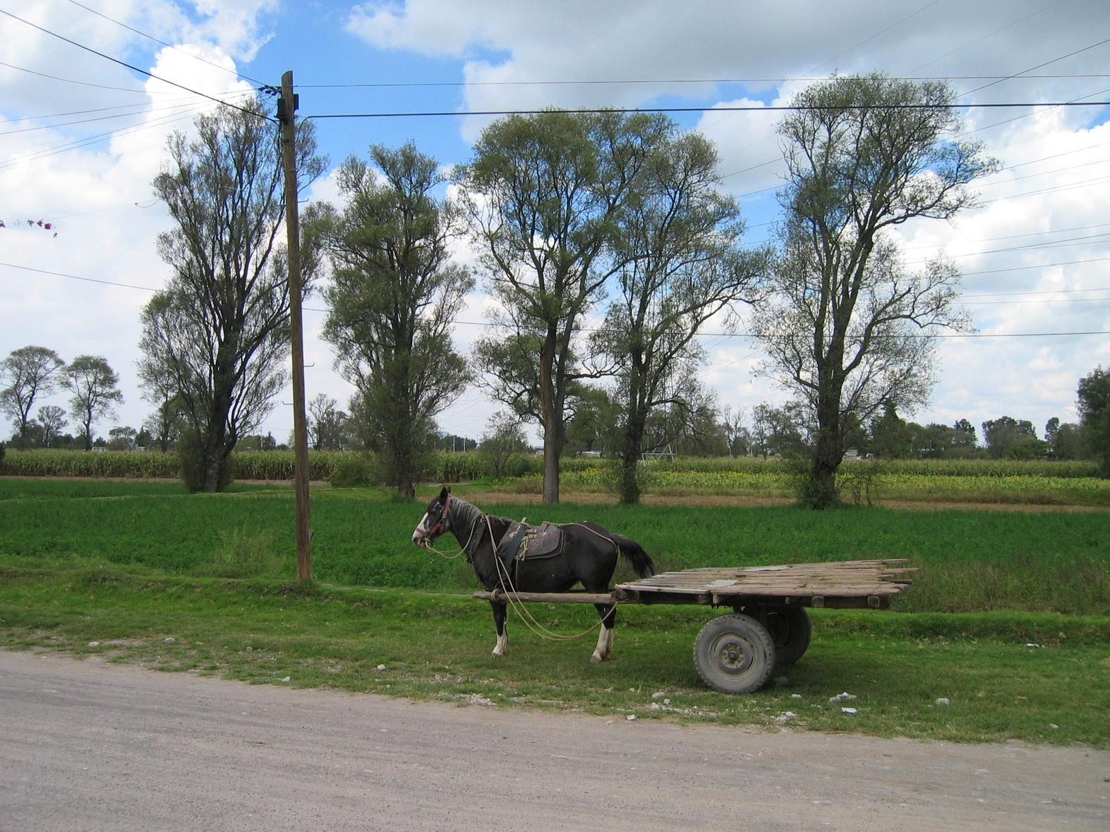 Zona ejidal en San Miguel Tocuila, Texcoco, Estado de México, México